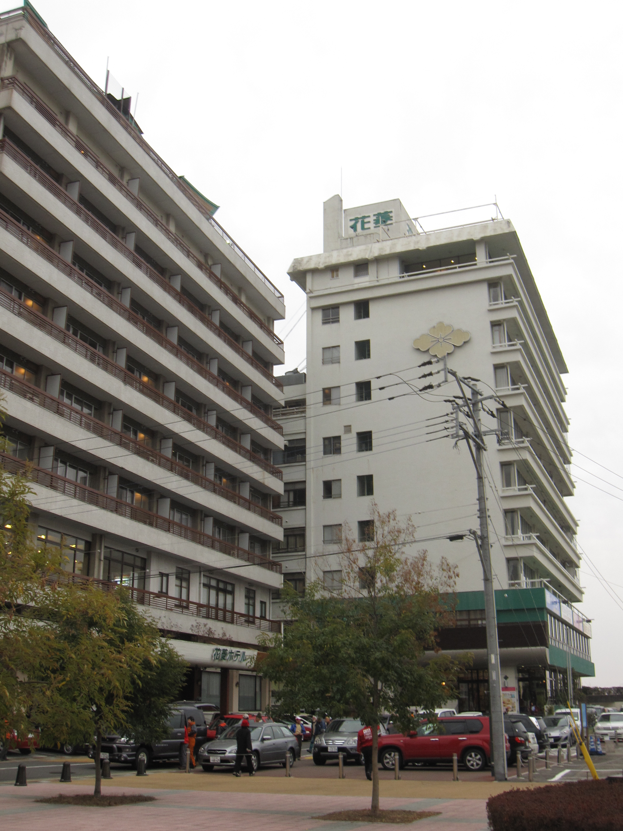 花菱ホテル Beppu Hanabishi Hotel